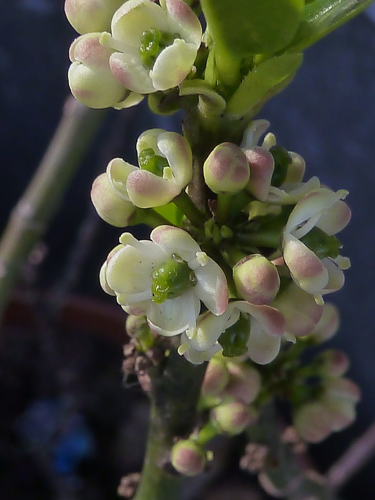 Ilex aquifolium (Acebo) : Flores femeninas en antesis, detalle, C./ Goya, 107, adorno, cultivado en maceta, Madrid (España).